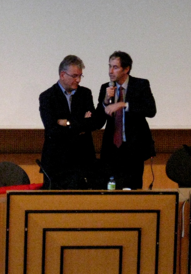 Olivier Duhamel (à gauche) et Richard Descoings (à droite) à Sciences Po, à la fin du dernier cours de M. Duhamel à l'Institut.